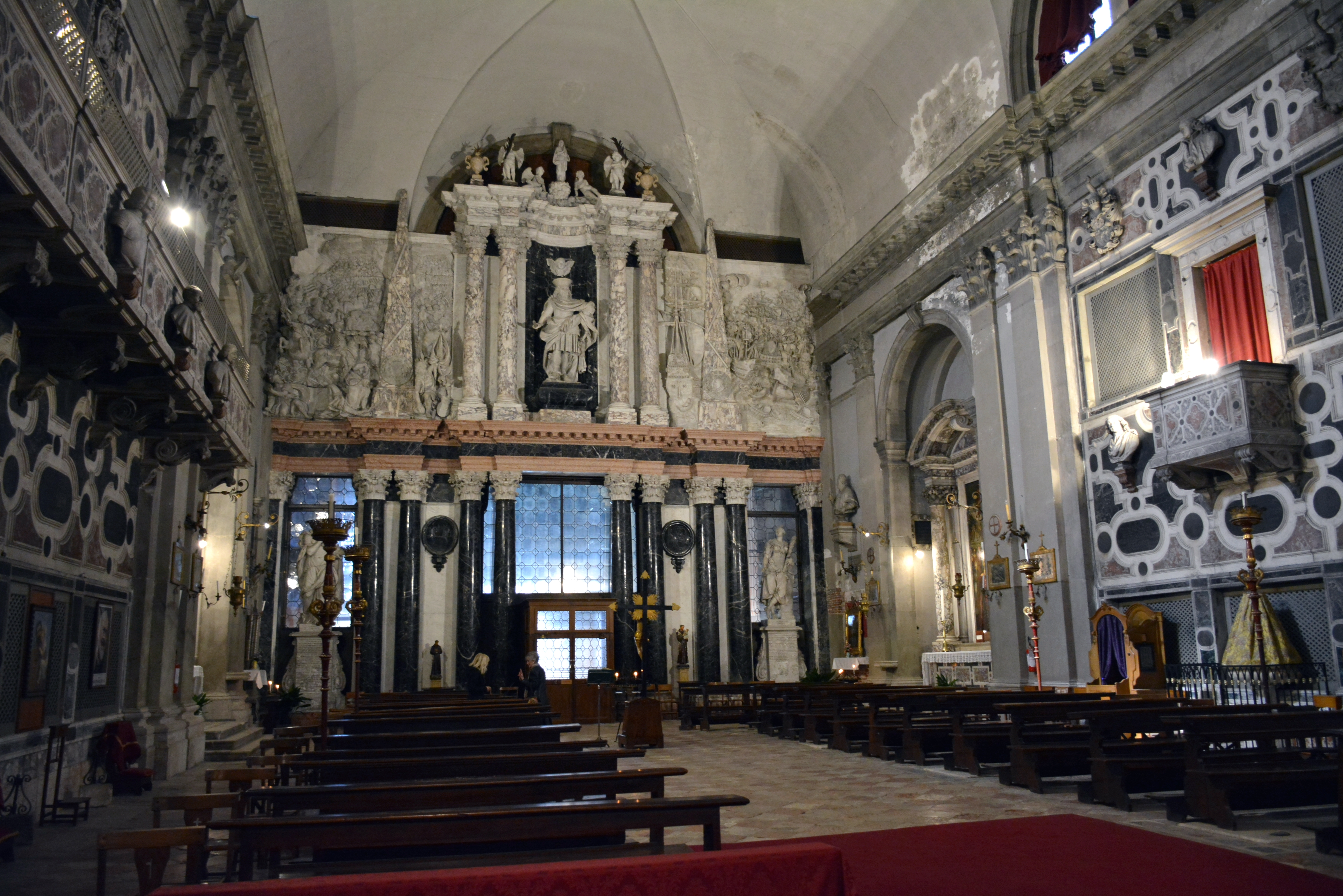 Chiesa di San Lazzaro dei Mendicanti INDIRIZZO: Fondamenta dei Mendicanti - Castello La chiesa, ora parte dell’Ospedale di Venezia, era la cappella dell’ospizio dei Mendicanti una delle più importanti realtà assistenziali di Venezia. Il complesso venne realizzato da Vincenzo Scamozzi (1601-1631) che collocò la chiesa con la semplice facciata palladiana tra le due ali degli edifici destinati a ricovero. All’interno si conserva Sant’Elena con la croce, unica opera lasciata a Venezia dal celebre pittore bolognese Guercino